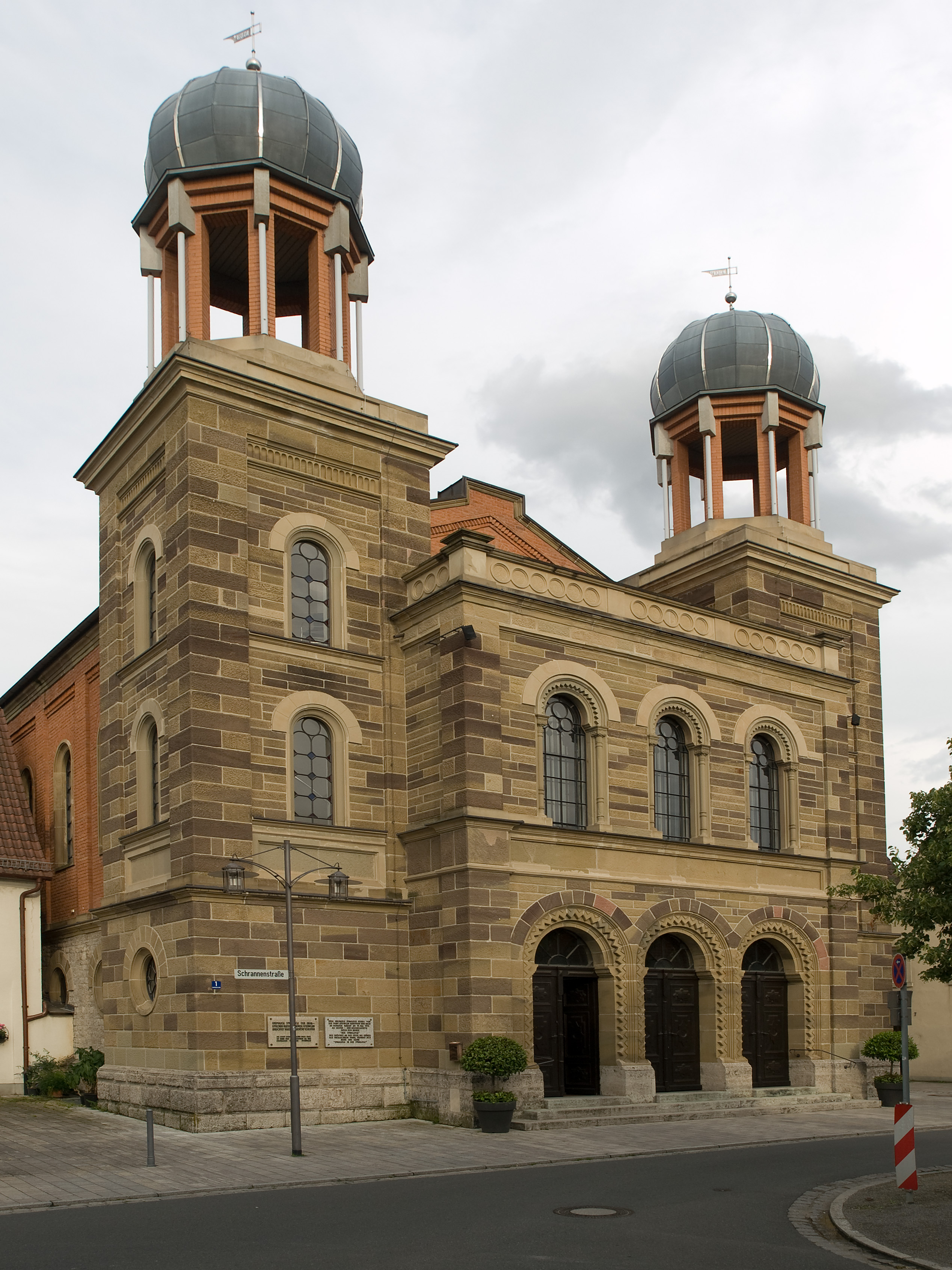 Alte Synagoge in Kitzingen